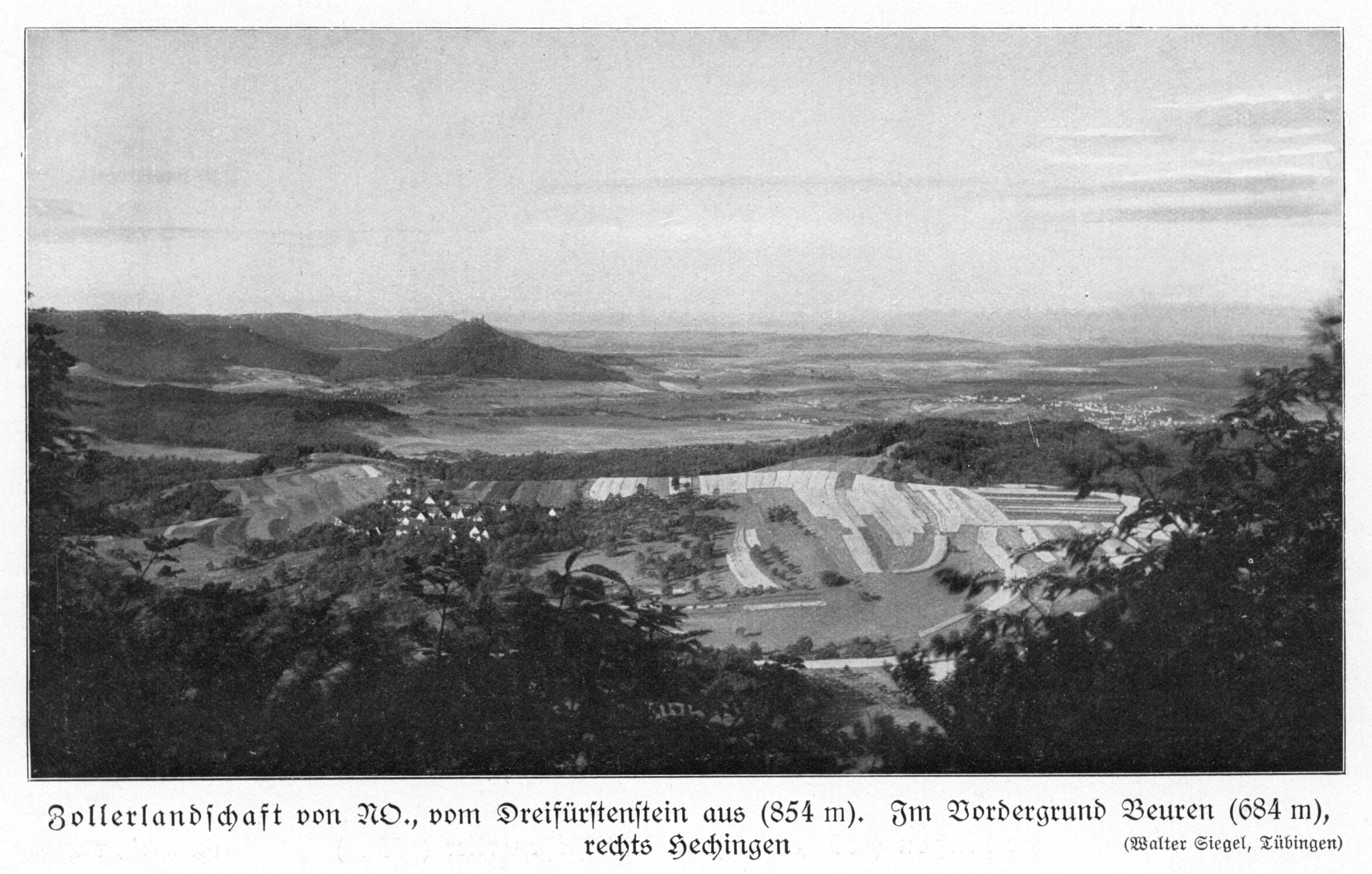 Zollerlandschaft von NO., vom Dreifürstenstein aus (854 m). Im Vordergrund Beuren (684 m), rechts Hechingen.